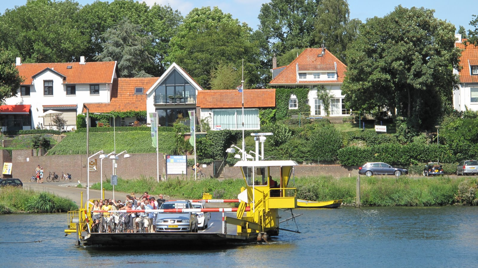 Beesel, Netherlands